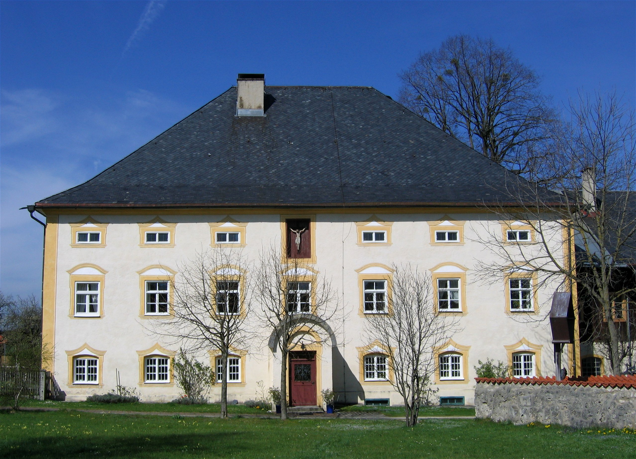 Dorfstraße 21, Osterwarngau, Warngau; Pfarrhaus, Stattlicher Walmdachbau, 1723. D-1-82-136-63